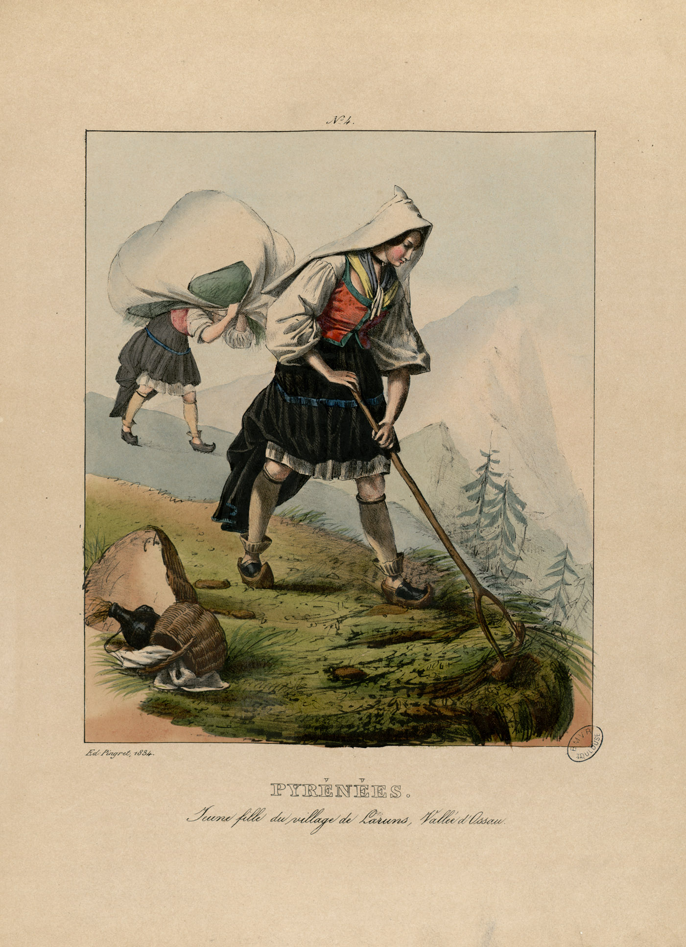 Ancely, René (1876 - 1966). Possesseur